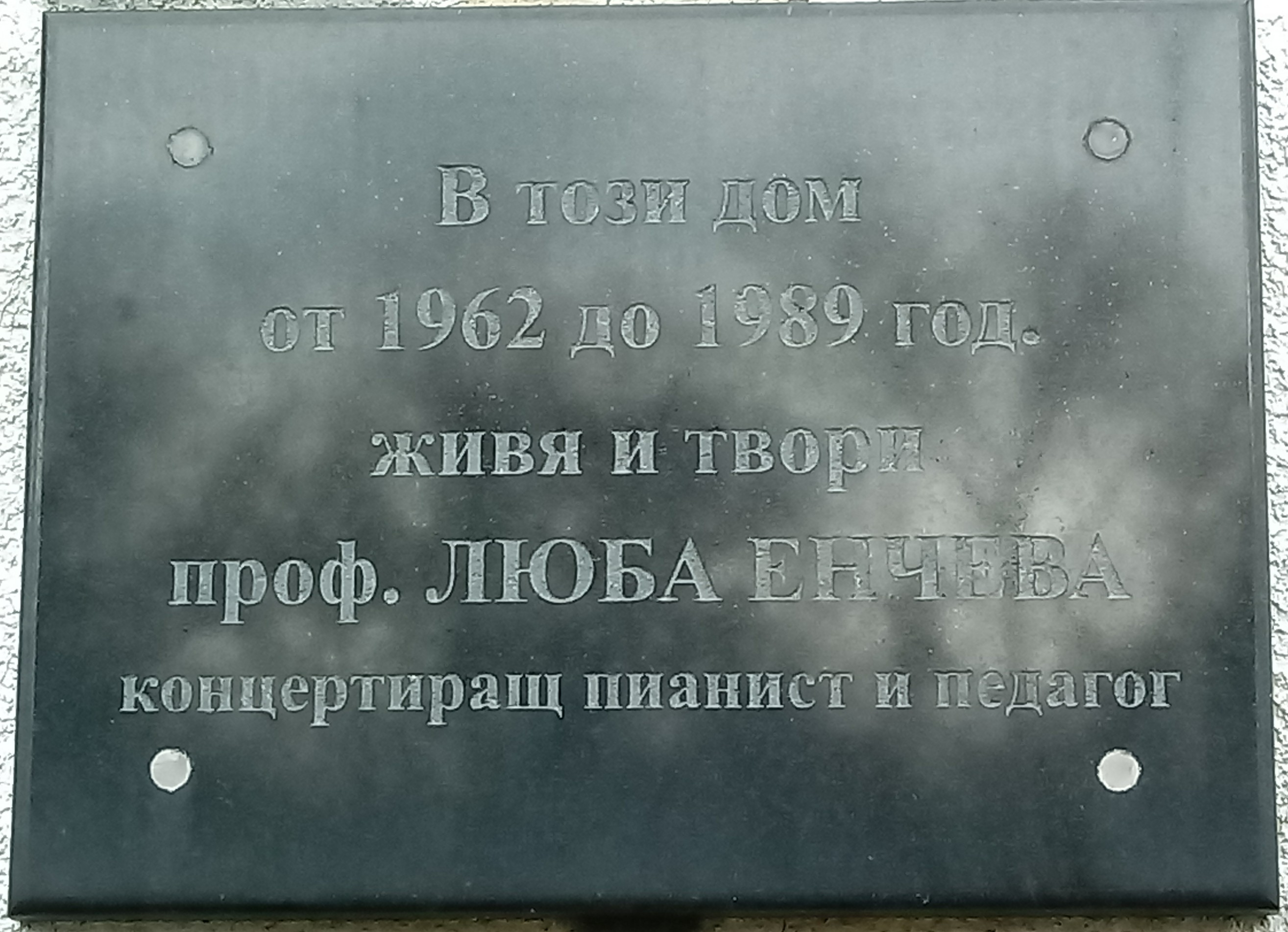 Lyuba Encheva memorial plaque, 41 Tsarigradsko Chausee Blvd., Sofia